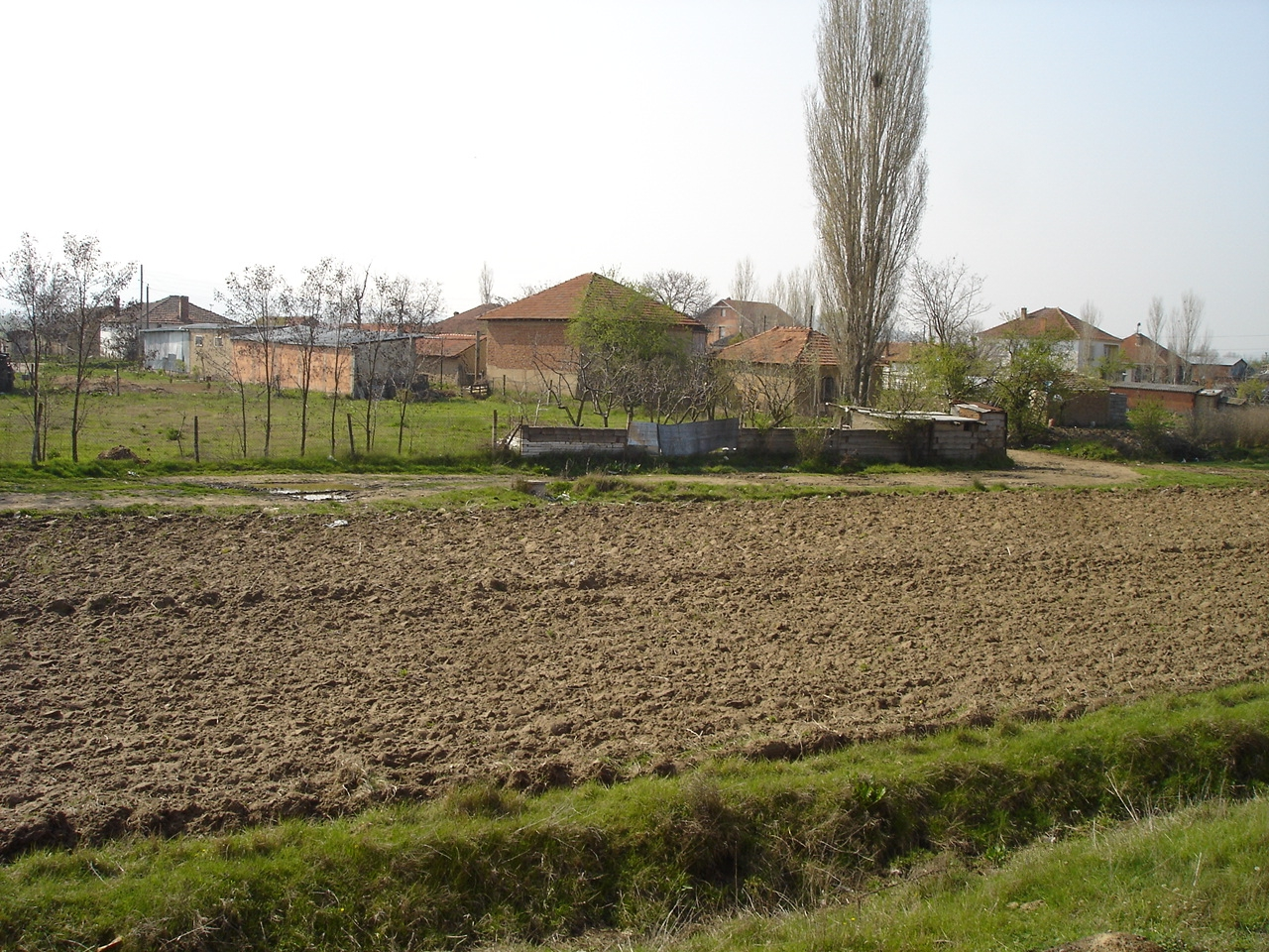 Vesnice Galičani v blízkosti Prilepu, Republika Makedonie